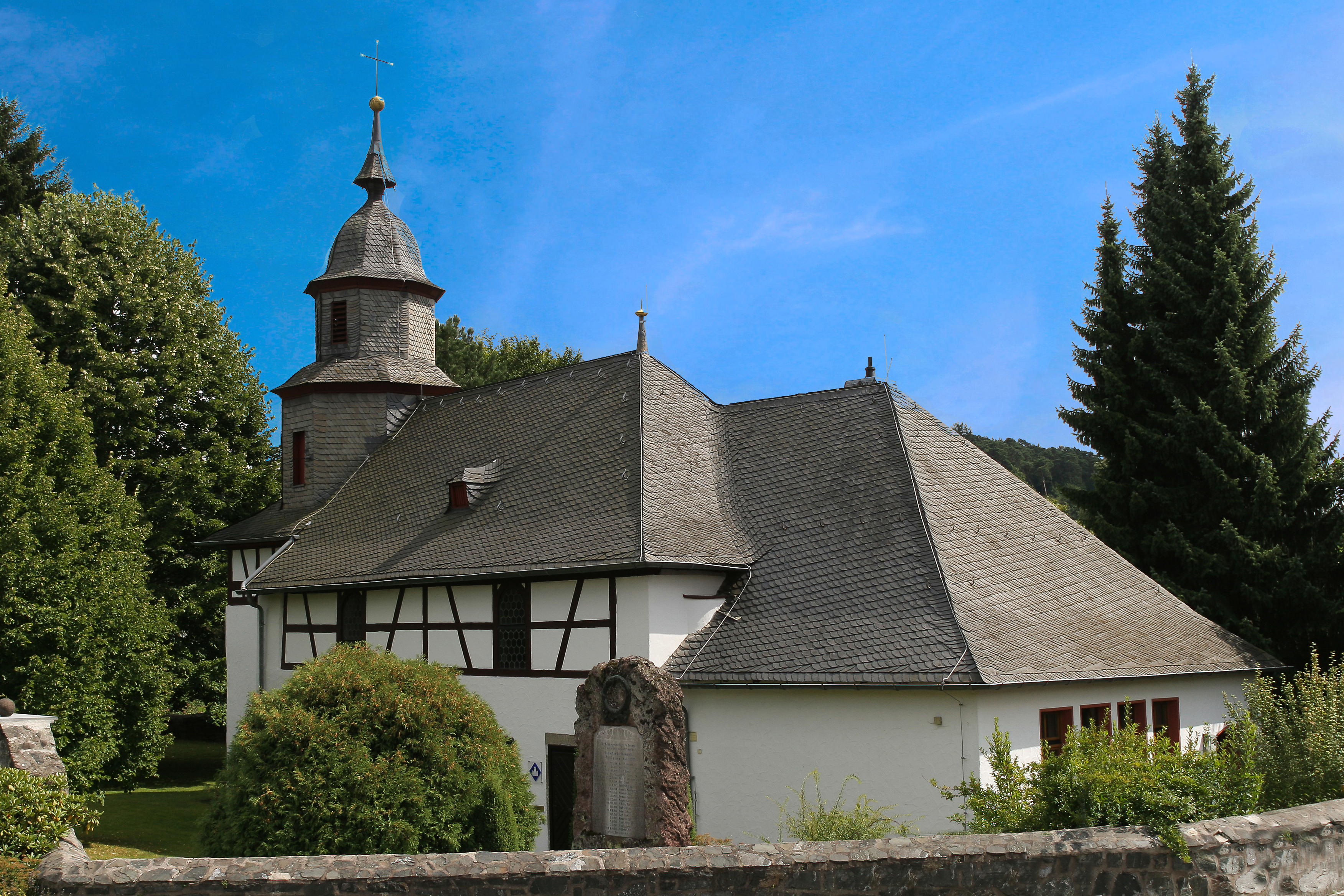 Evangelische Kirche Oberndorf, Solms, Lahn-Dill-Kreis, Hessen, Deutschland